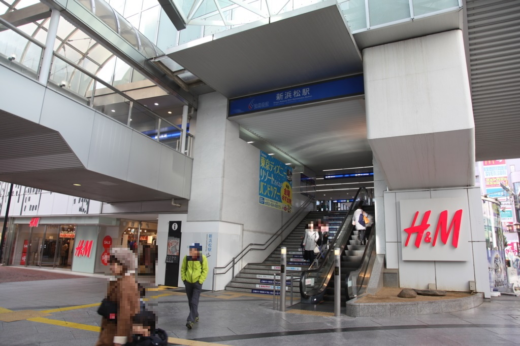 新浜松駅 - 駅舎